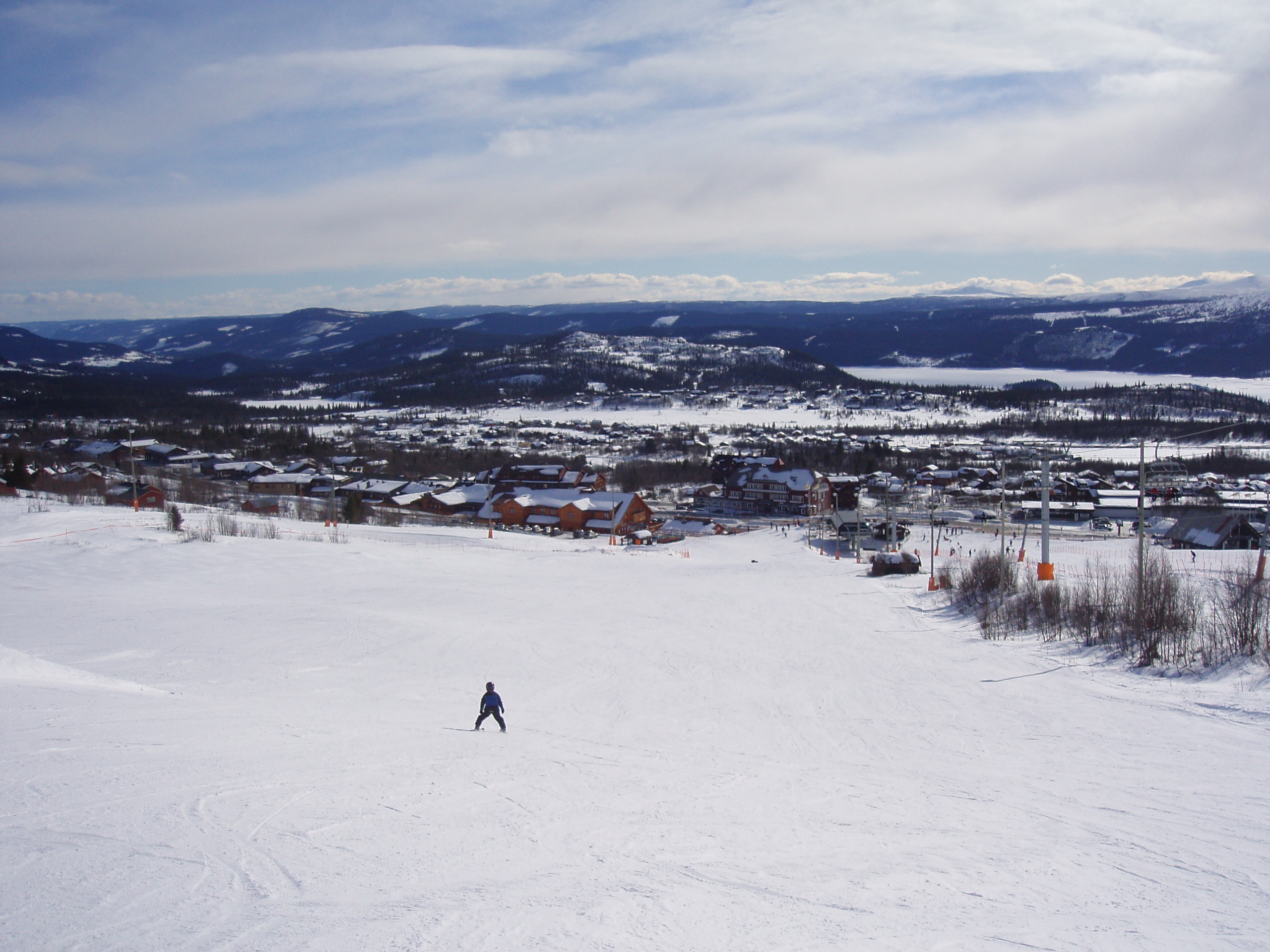 Beitostølen, Norway, 2006 Photographer: me